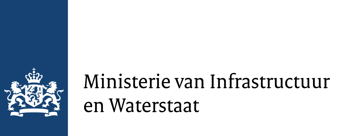 Het officiële logo van het Ministerie van Infrastructuur en Waterstaat